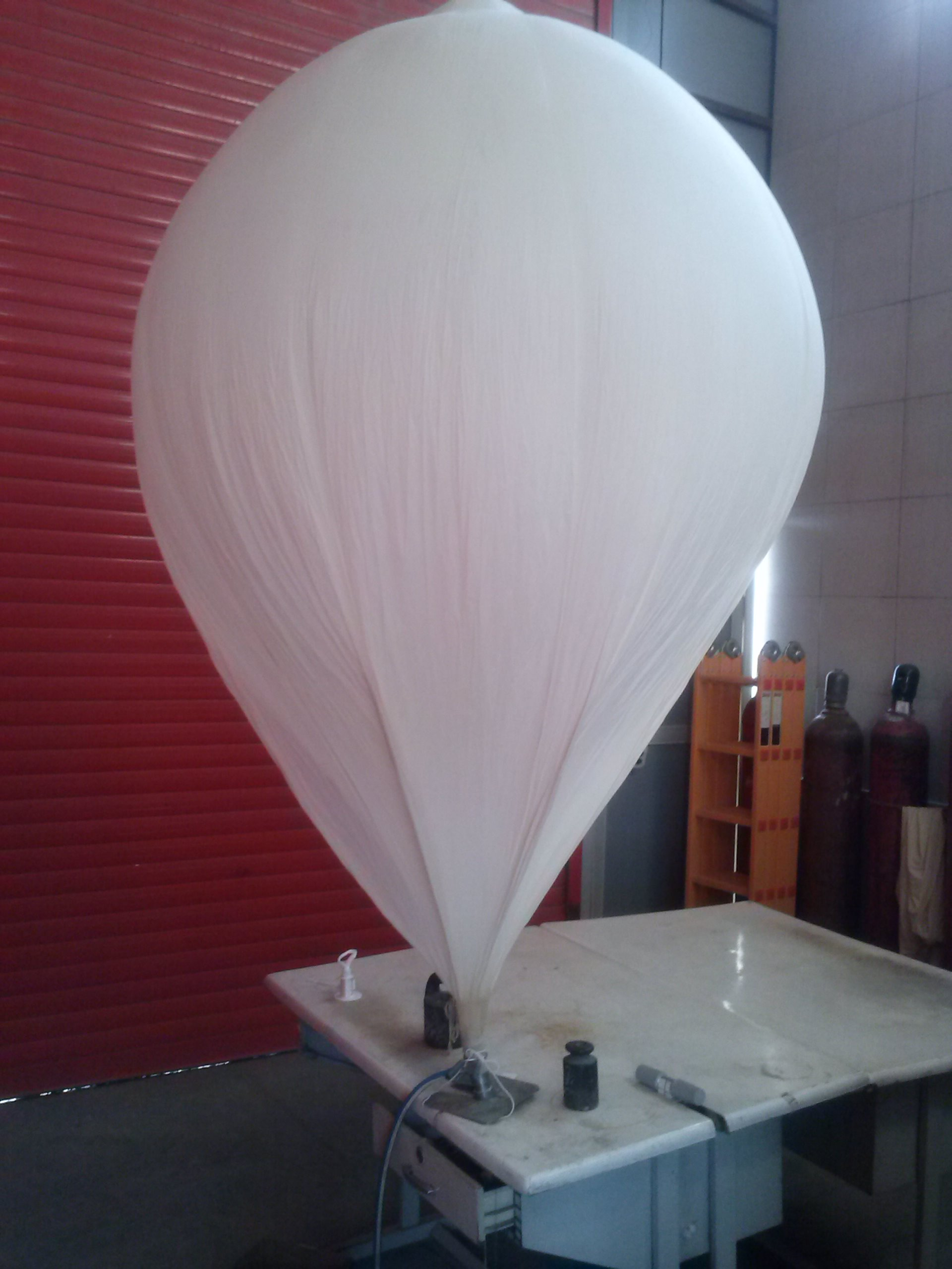 بالون هواشناسی 600 گرمی جهت ارسال رادیوسوند در اتاق گاز یکی از ایستگاه های هواشناسی